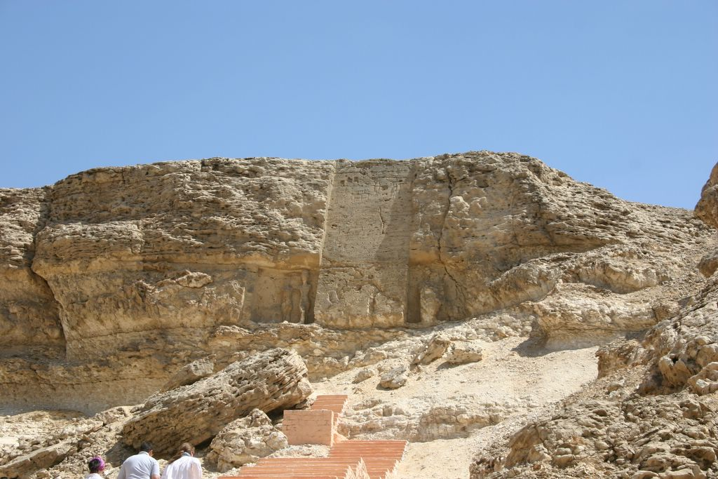 Stelae U at Ahketaten (Amarna)